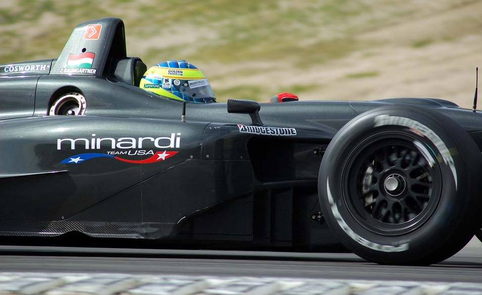 Zsolt Baumgartner (Minardi Team USA) lors d'essais en ChampCar en 2007 sur le circuit de Laguna Seca.